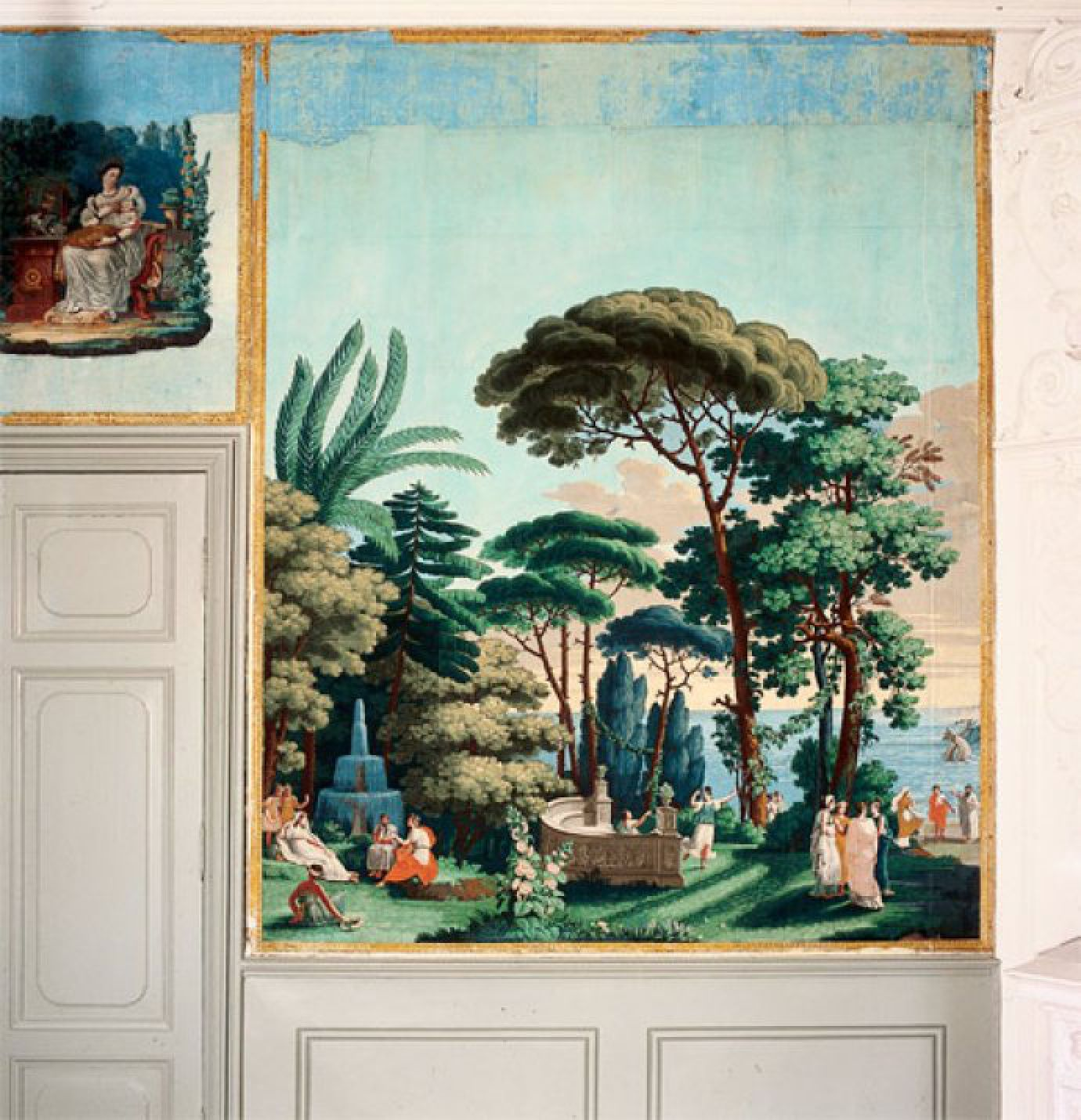 Das Bild zeigt einen Ausschnitt der Bildertapete des Gartensaals im Herrenhaus Borghorst